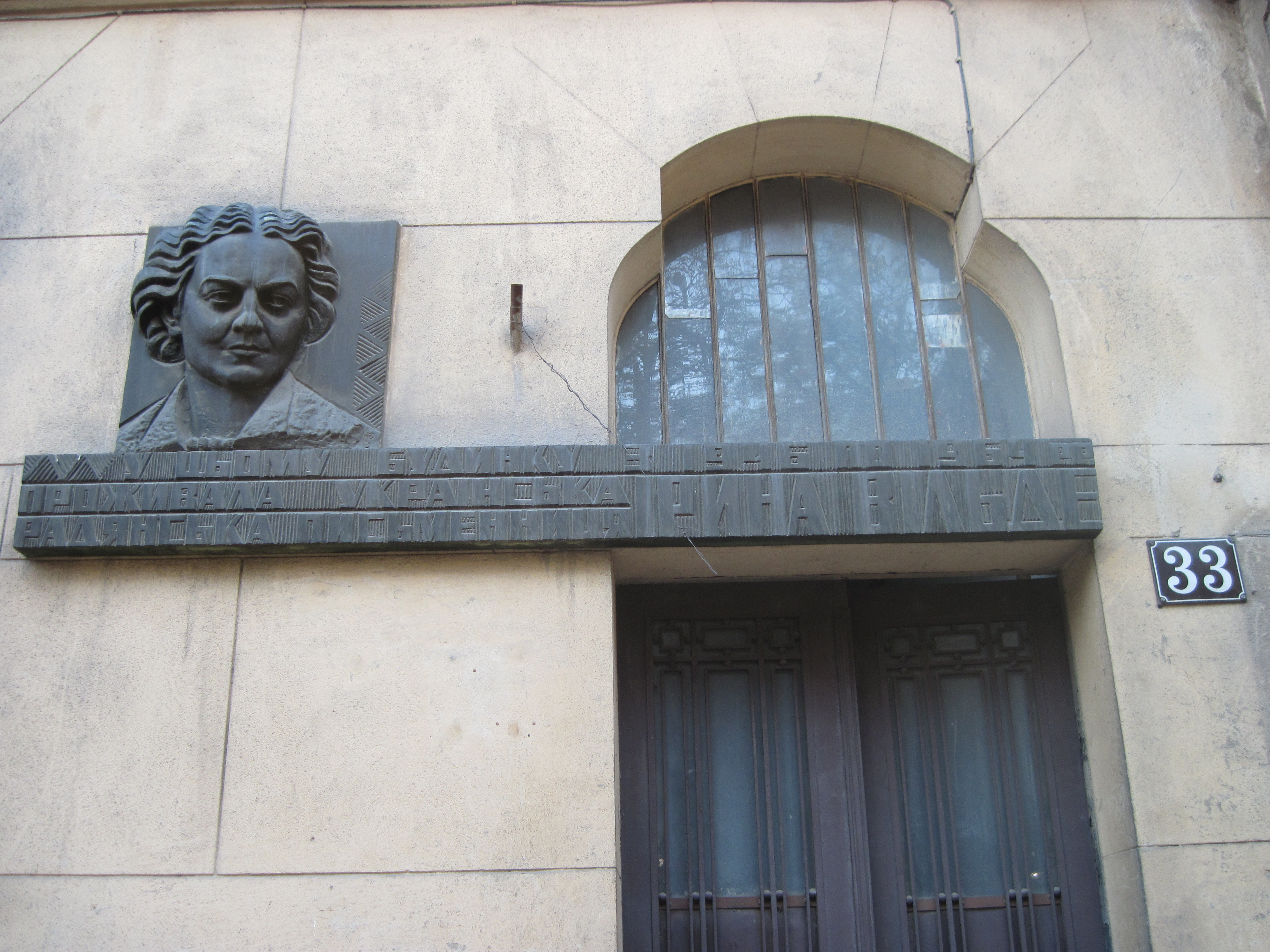 Памятна дошка Ірині Вільде, Львів